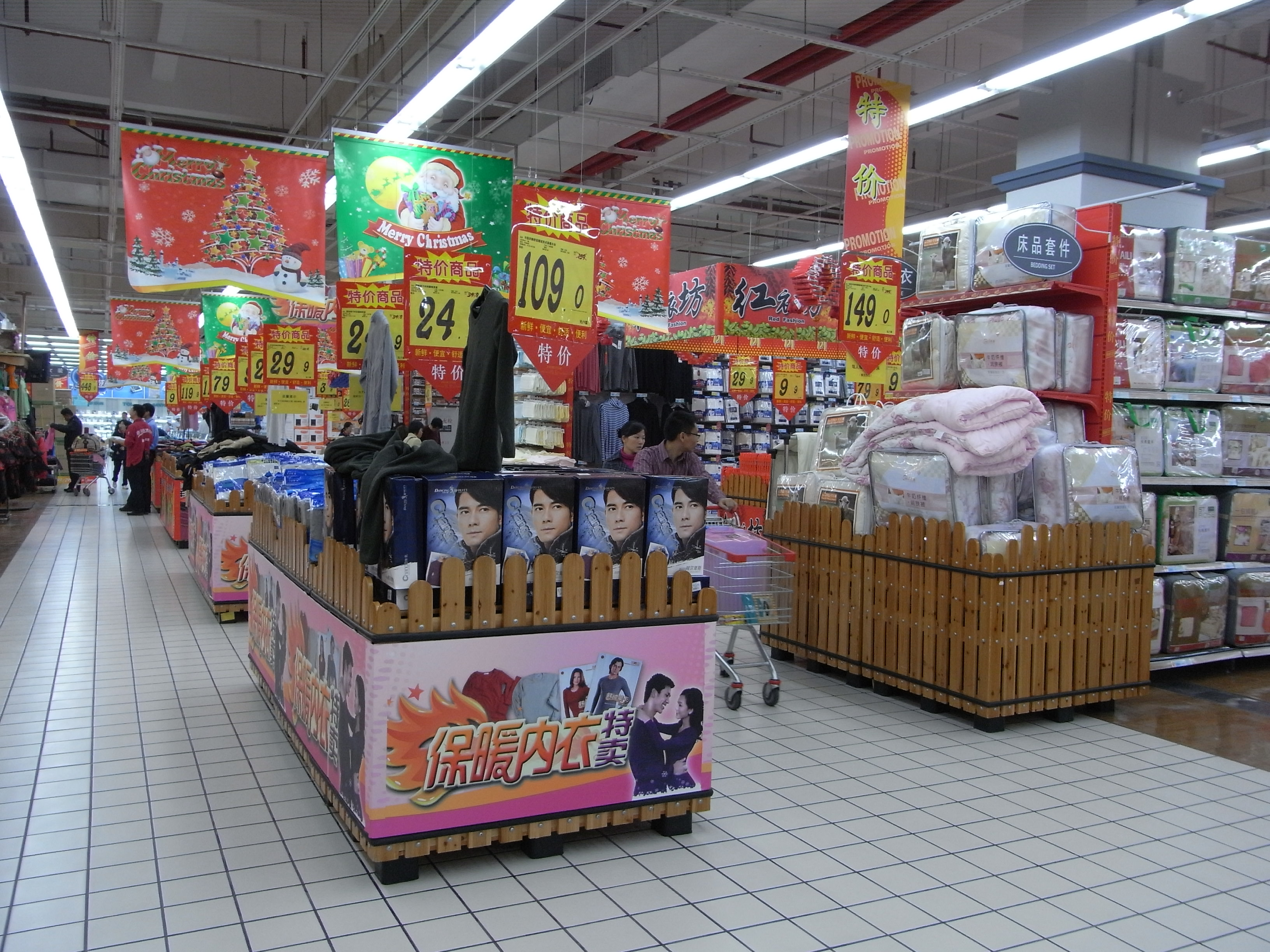 廣東省江門市新會碧桂園大潤發銷貨場